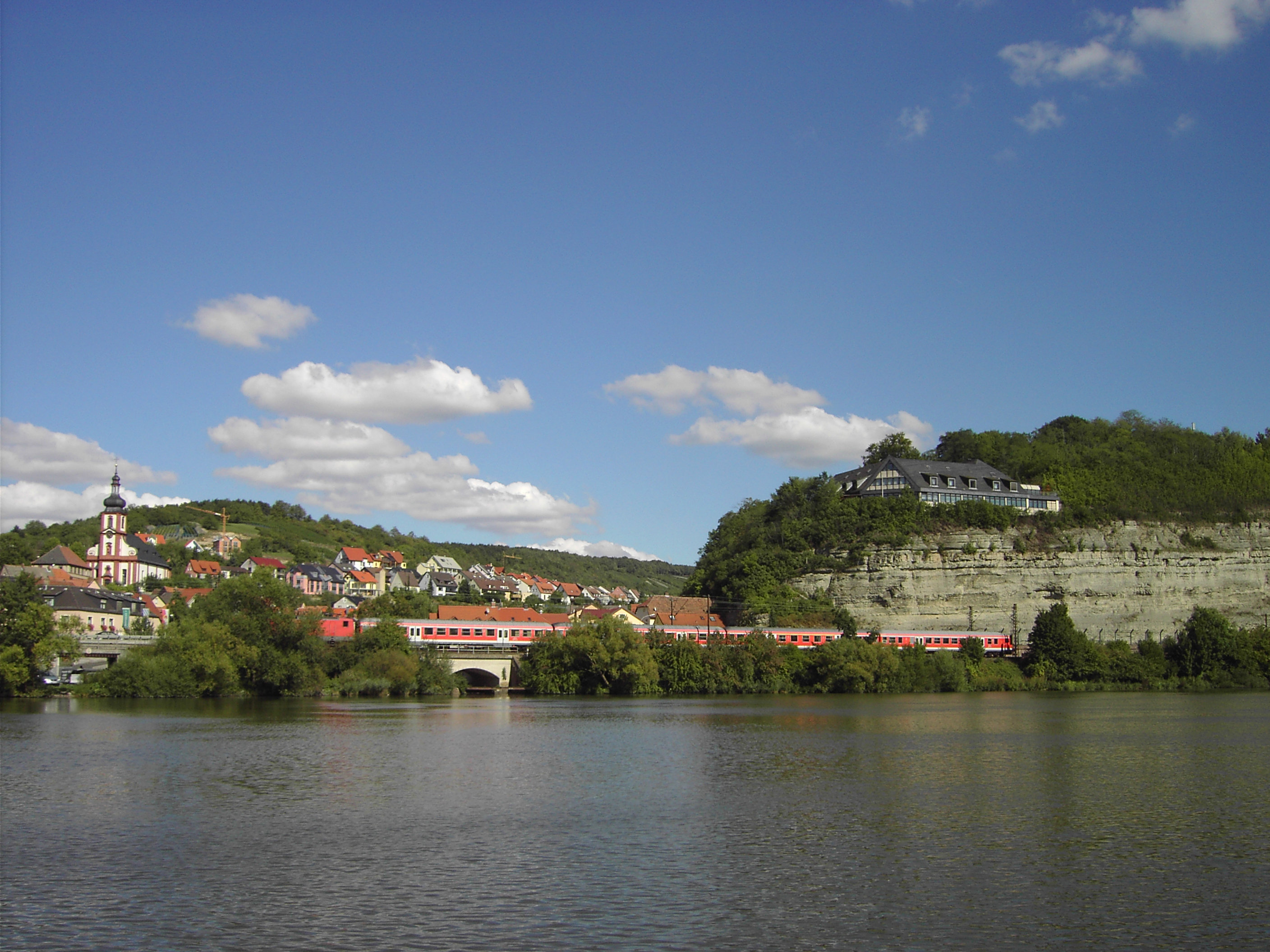 Ein von der Baureihe 112 gezogener Wendezug, gebildet aus vier ehemaligen "Silberlingen" passiert als RegionalBahn Treuchtlingen - Würzburg - Gemünden (Main) gerade die malerische Ortskulisse von Retzbach am Main und wird in wenigen Augenblicken am Bahnhof Retzbach-Zellingen stoppen.